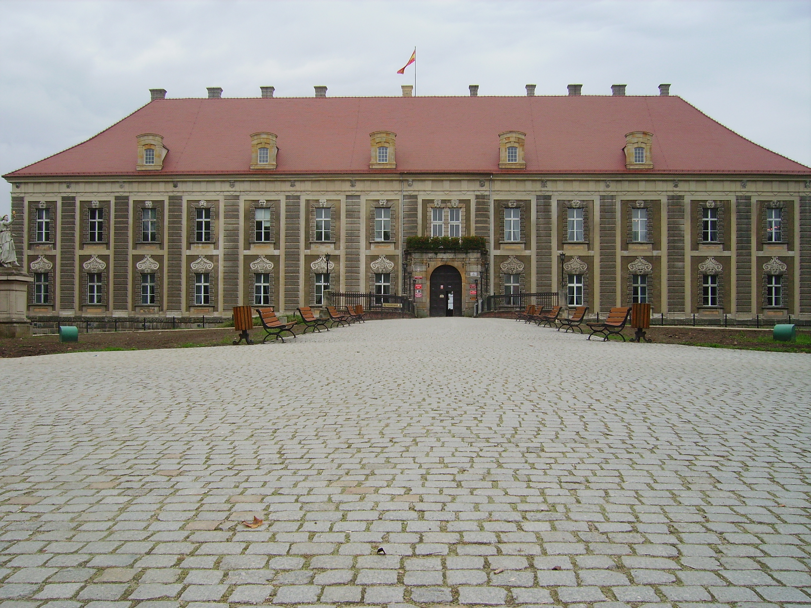 Żagań, pałac, 1631-1633, 1670-86, XVIII-XIX